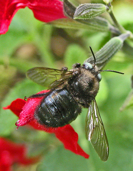 Xylocopa tabaniformis male